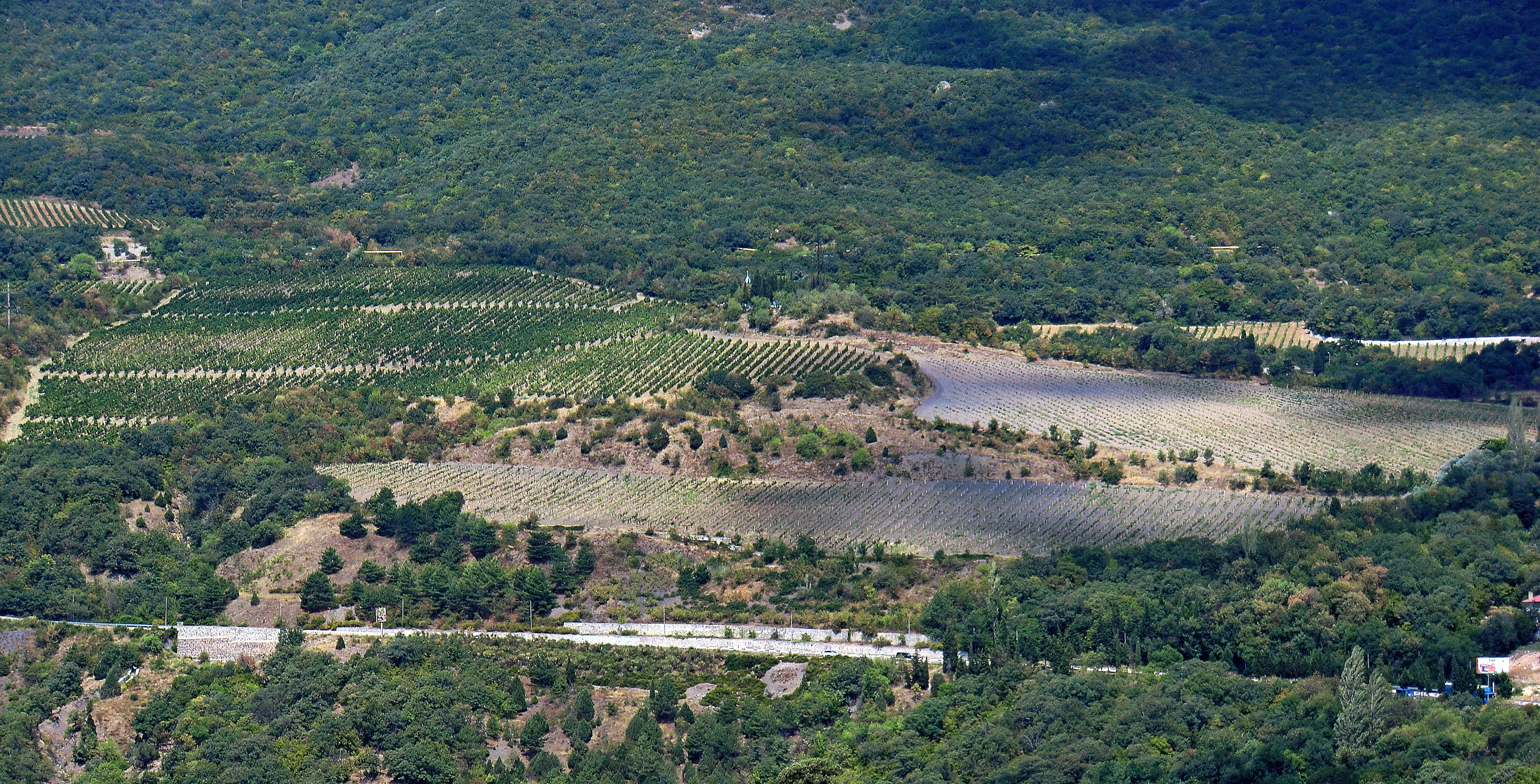 Высокогорные виноградники винодельческого предприятия Ливадия (ГП Ливадия), входящего в состав ФГУП ПАО Массандра